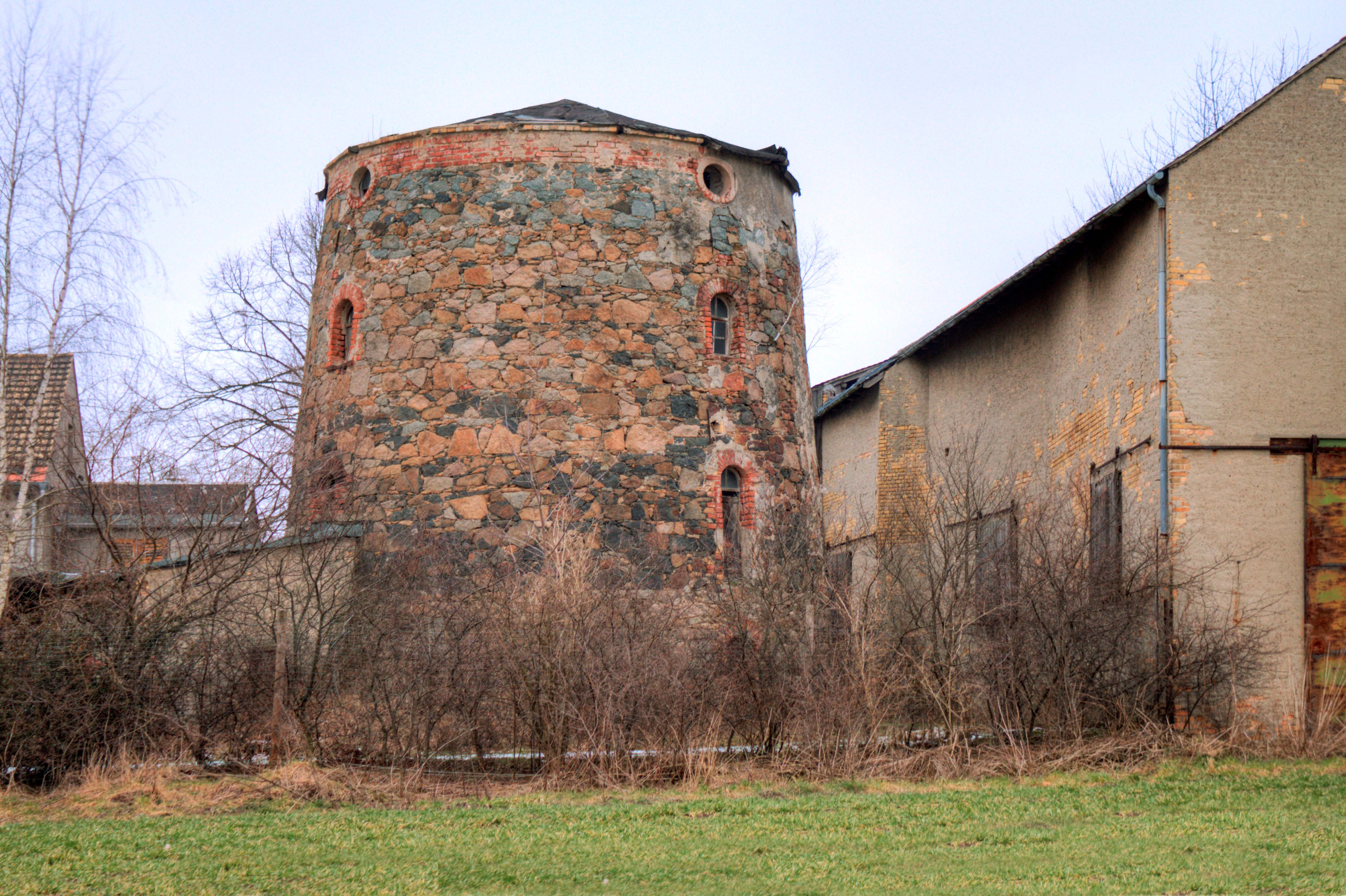 Turmholländermühle Kleinsteinberger Straße in Brandis OT Beucha